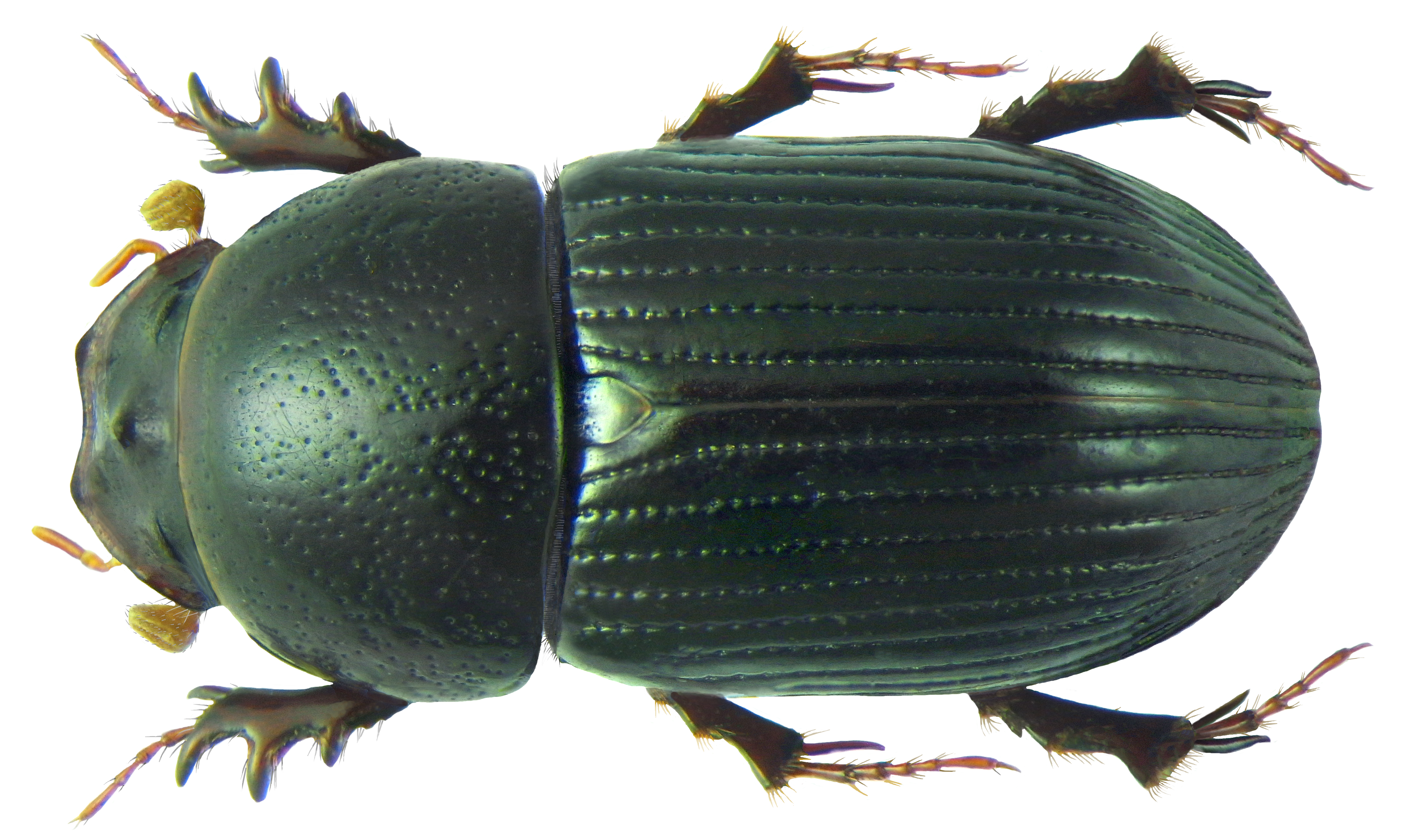 Familie: Scarabaeidae Groesse: 6,6 mm Fundort: Malaysia, Langkawi, Umgebung Hotel Berjaya leg. U.Schmidt, 7.-22.XI.2009; det. Bellmann, 2011 Photo: U.Schmidt, 2012